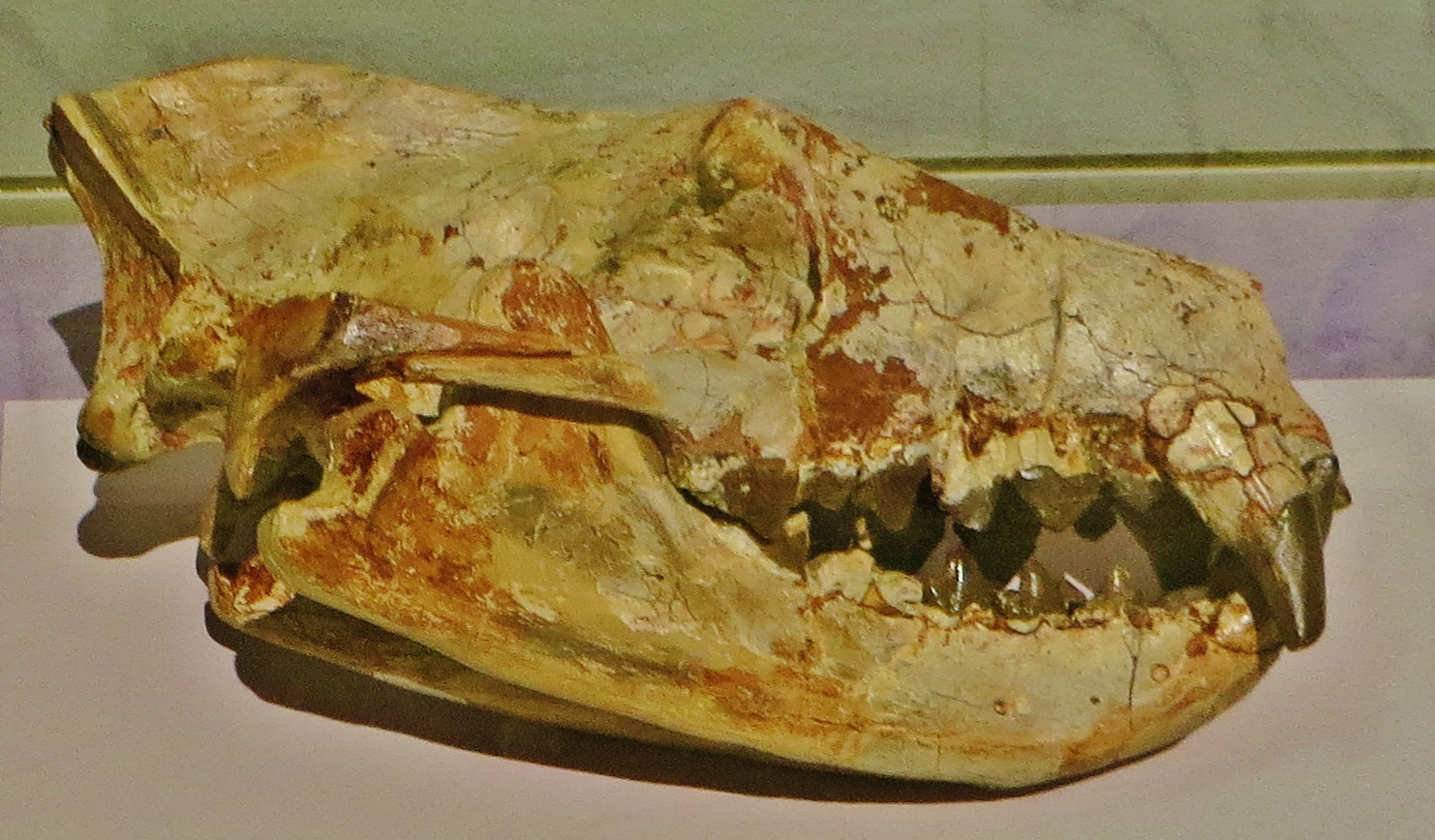 Fossil - Took the picture at Museum of Natural History, Karlsruhe